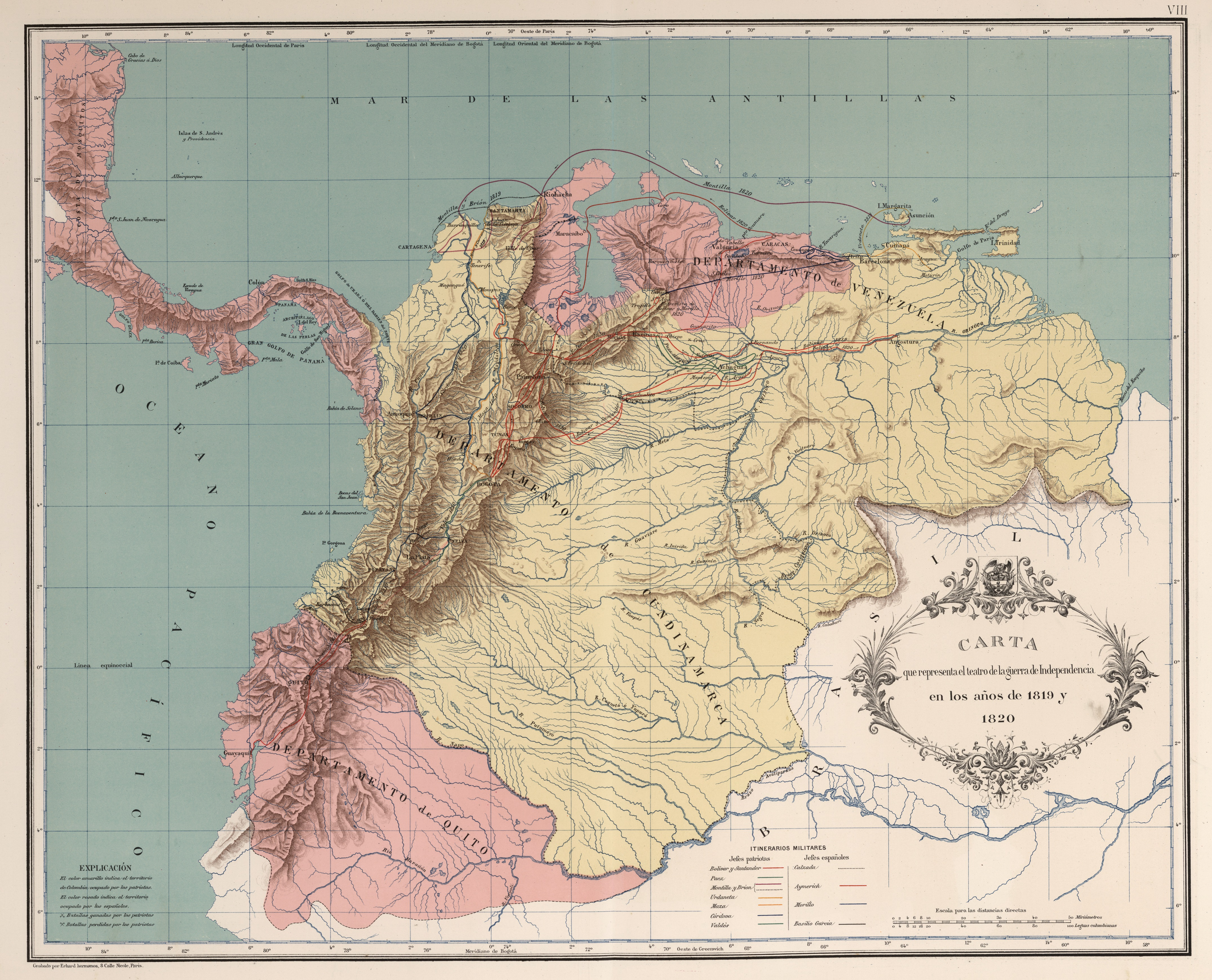 Carta que representa el teatro de la guerra de independencia años 1819 y 1820. Carta VIII del Atlas geográfico e histórico de la República de Colombia, 1890.